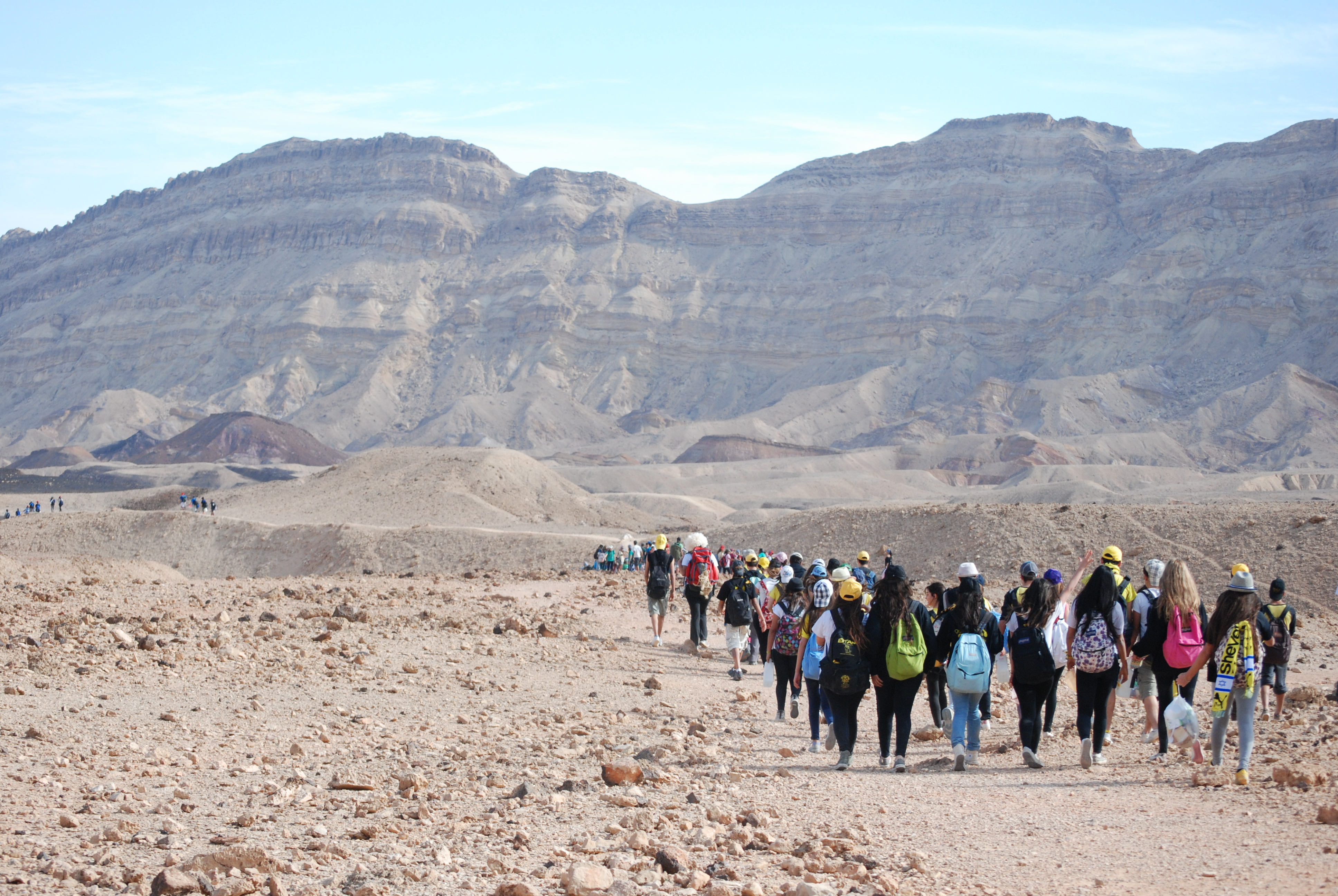 טיולי חנוכה במדבר יהודה - תנועת הצופים